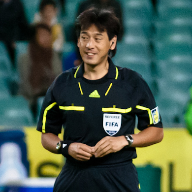 Yuichi Nishimura